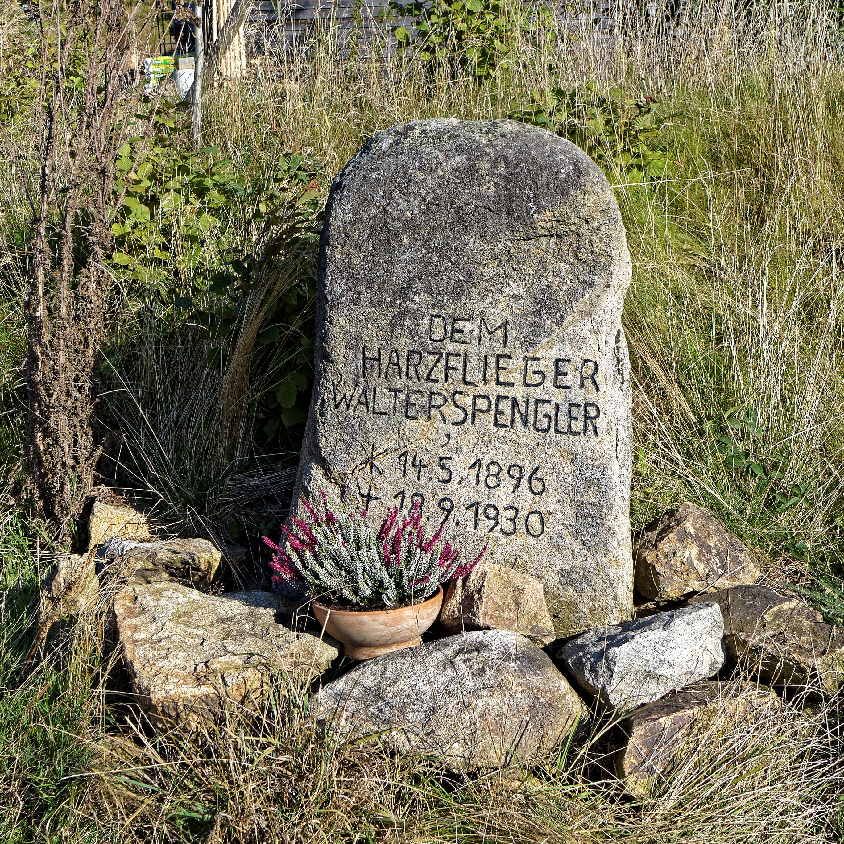 Gedenkstein für den Harzflieger Walter Spengler in Torfhaus